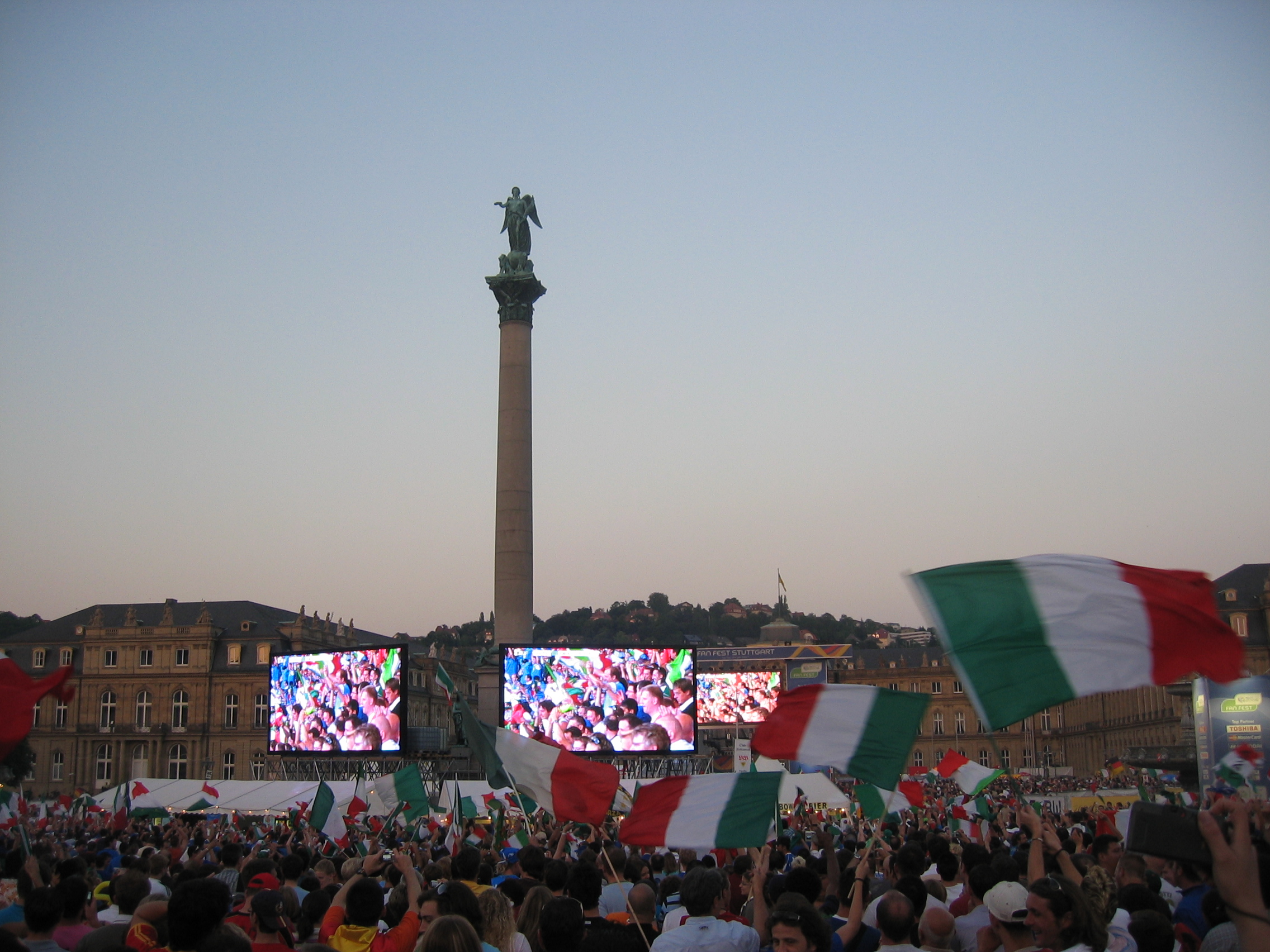 Nach dem 1:0 für Italien kam Stimmung auf dem Schlossplatz in Stuttgart auf, die jedoch kurz darauf leider durch den Ausgleich der US-Amerikaner und die rote Karte für Italien vernichtet wurde. Die Fans von Italien waren den Fans der USA eindeutig überlegen.